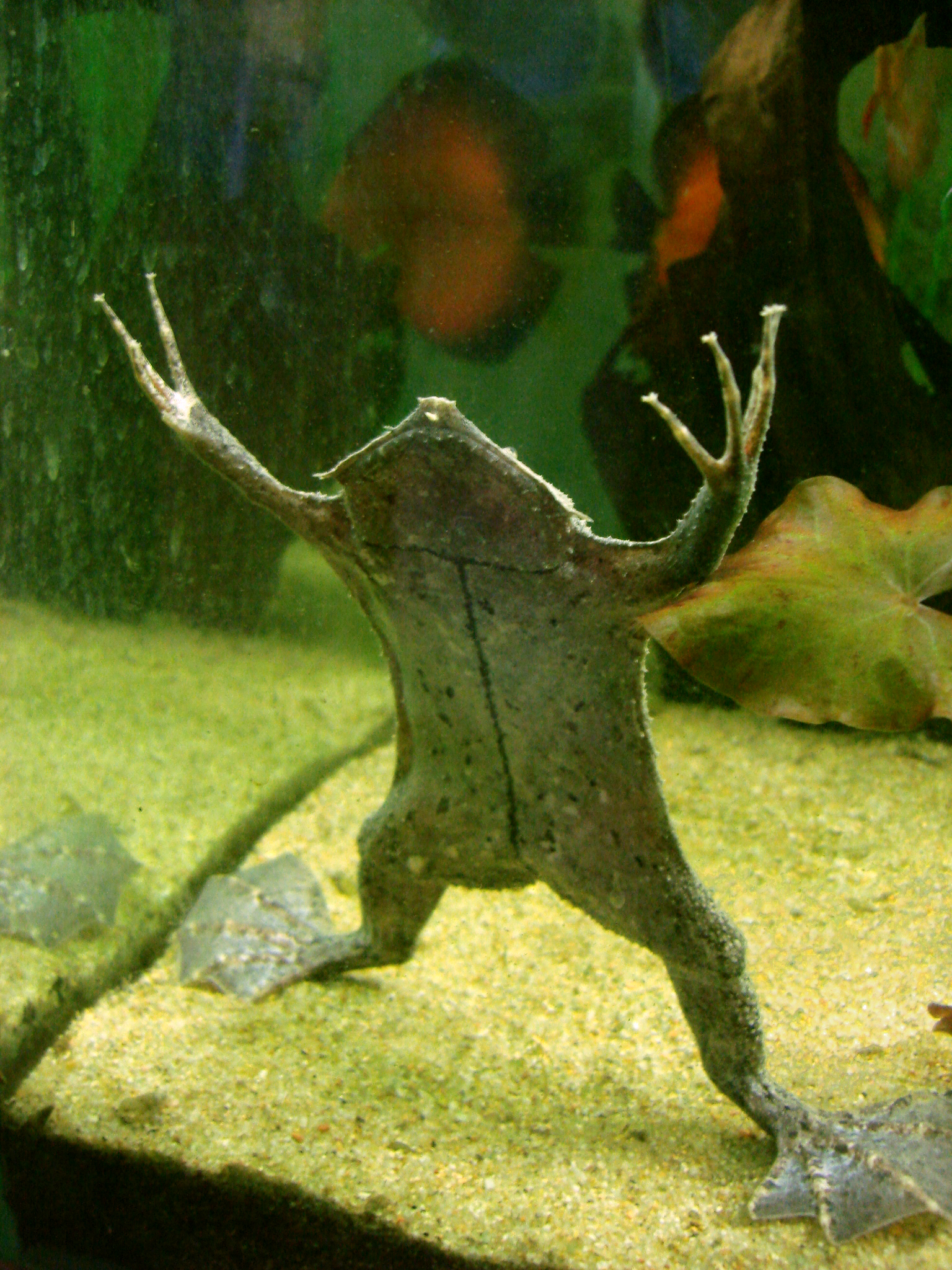 Pipa pipa